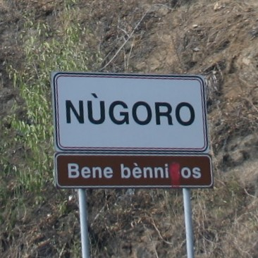 Straßenschild am Ortseingang von [Nuoro], [Sardinien]. Das Schild trägt nur die Sardische, nicht aber die Italienische Ortsbezeichnung.